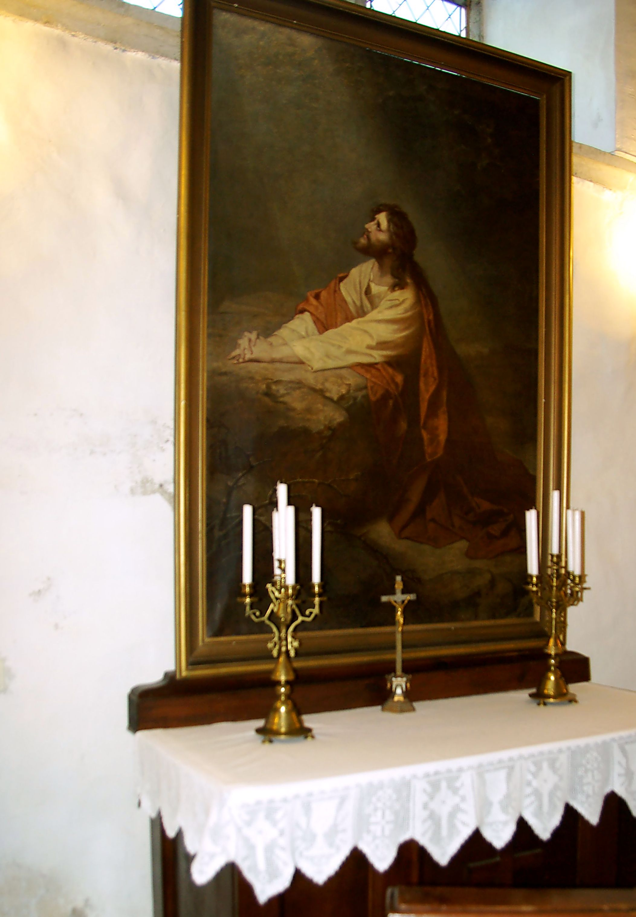 Maal «Kristus Ketsemani aias», J. Hagen- Schwarz H. Hoffmanni järgi, 19. saj. (õli, lõuend)